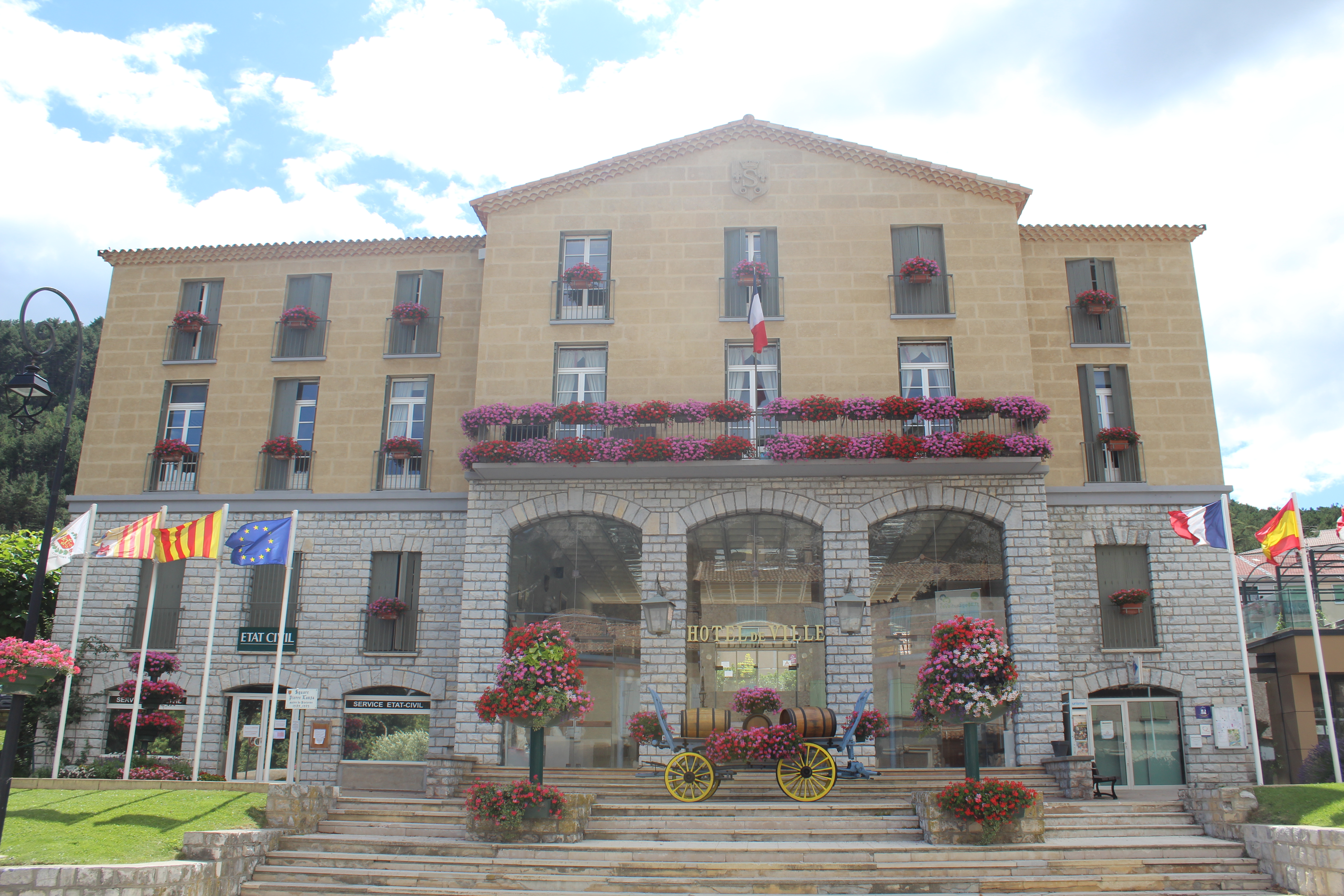 Hôtel de ville de Sisteron.